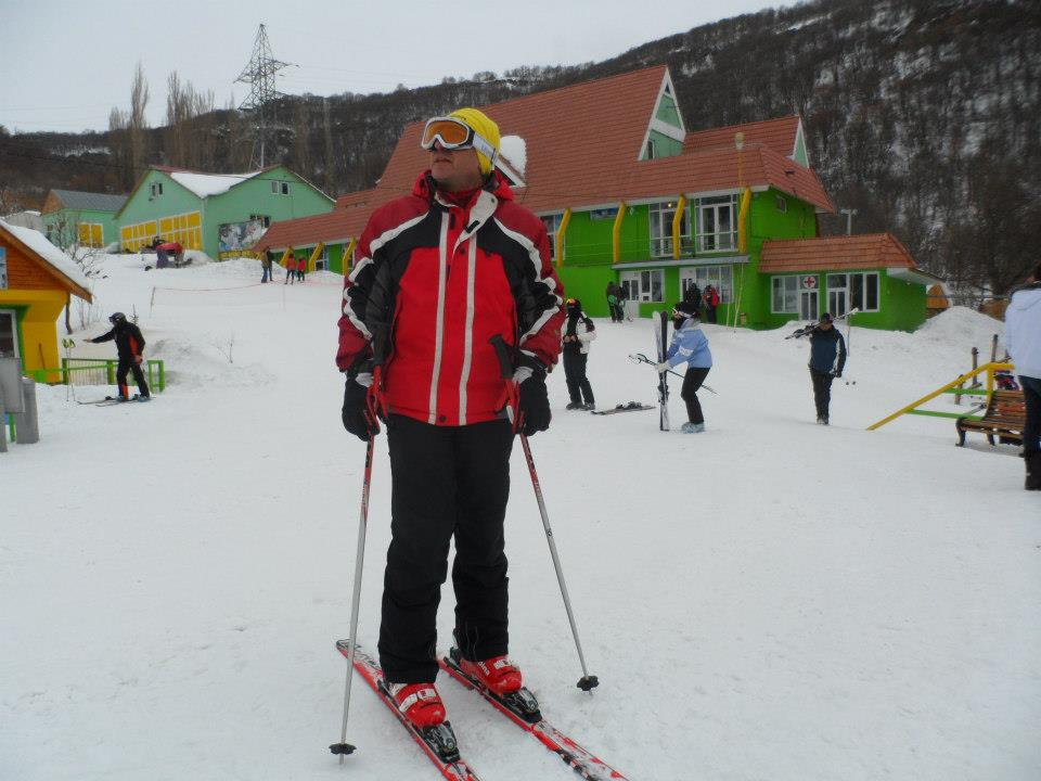 Ծաղկաձորի լեռնադահուկային առողջարան Կարեն Մելիքյան